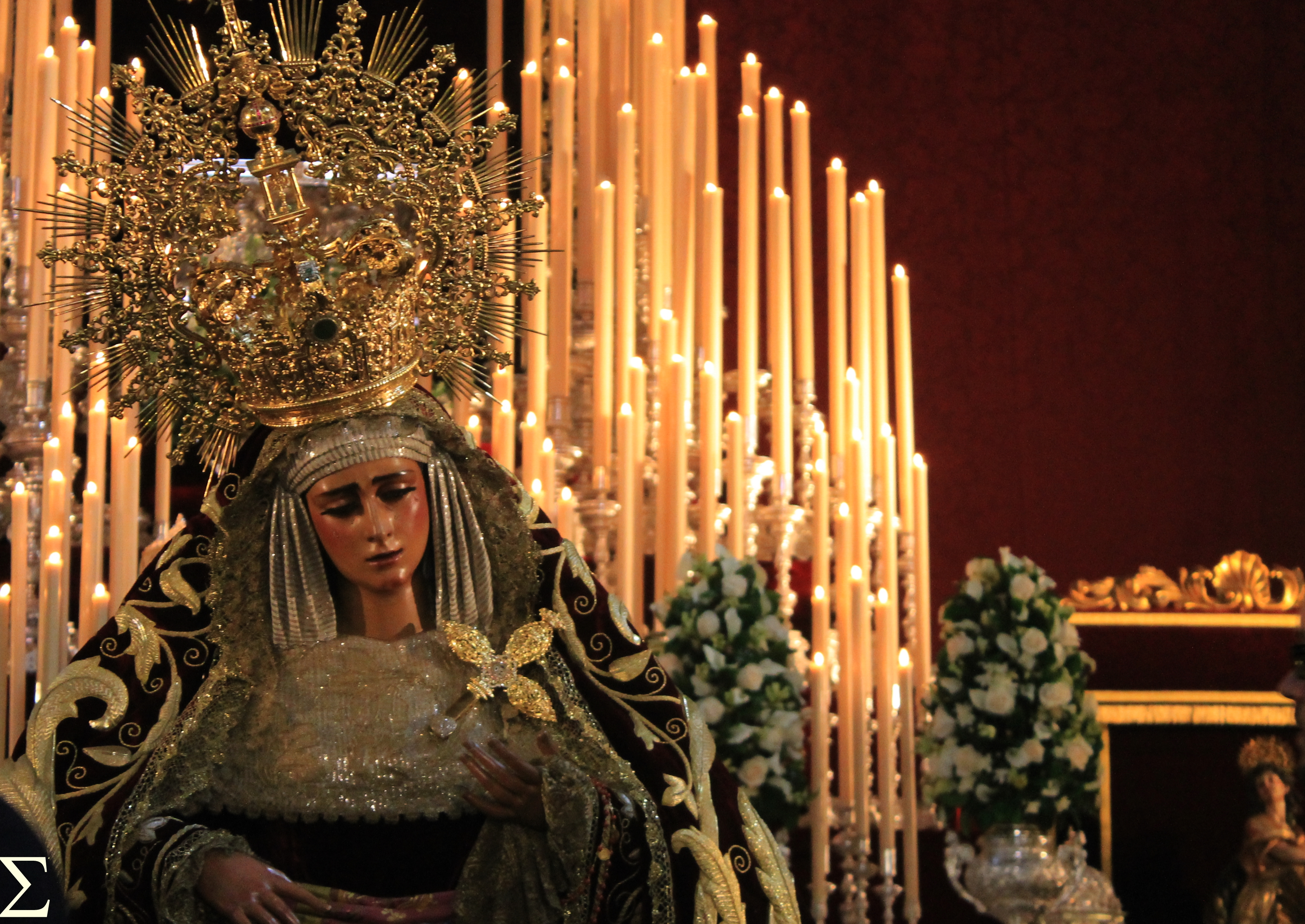 Besamanos de María Santísima de las Angustias. Santuario de la Hermandad Sacramental de los Gitanos de Sevilla.